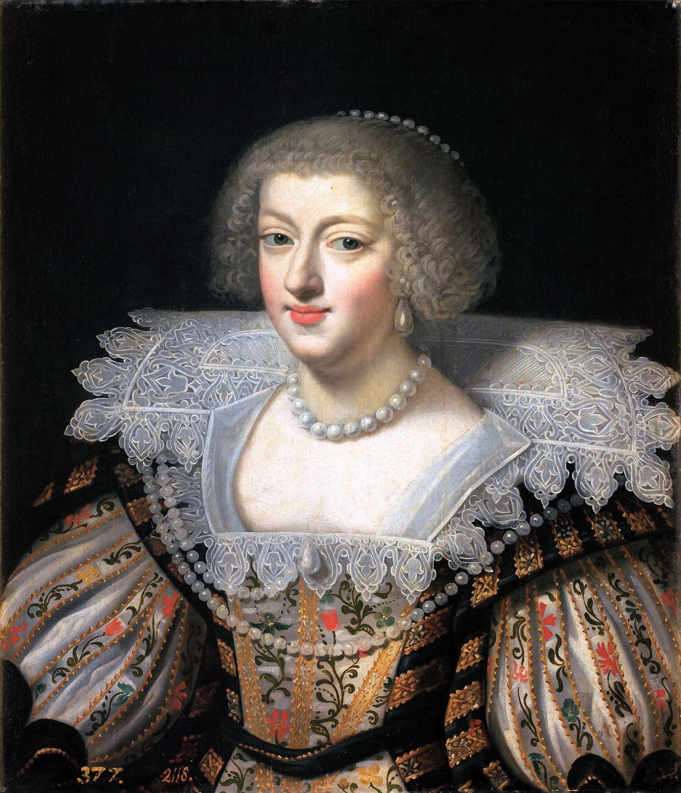 Retrato de la reina Anne of Austria (1601-1666), que fue hija del rey Felipe III de España y esposa del monarca Luis XIII de Francia.